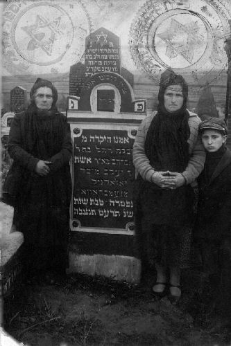 Rodzina Jagodników na cmentarzu zydowskim w Zambrowie, II dekada XX w.